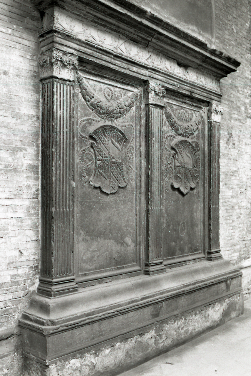 Servizio fotografico : Fano, 1972 / Paolo Monti. - Strisce: 3, Fotogrammi complessivi: 10 : Negativo b/n, gelatina bromuro d'argento/ pellicola ; 35 mm. - ((Sul portanegativi: NIKMAT FP4. - Occasione: Documentazione per la pubblicazione: Pica Agnoldomenico (a cura di), "Celebrazioni di Leon Battista Alberti, 1404-1472", catalogo della mostra, Roma 1972, Roma, Accademia nazionale di San Luca, 1972. - Fonte: Agenda di Paolo Monti: Leica 1501-3000 Controllo numerazione (1950-1978), presso Archivio Paolo Monti. - Fonte: Fattura di Paolo Monti: IV. Commesse/ fattura n. 39 (1972/12/21), presso Archivio Paolo Monti. - Fonte: Monografia di Borsi, Franco: Leon Battista Alberti, Milano, Electa (1975)